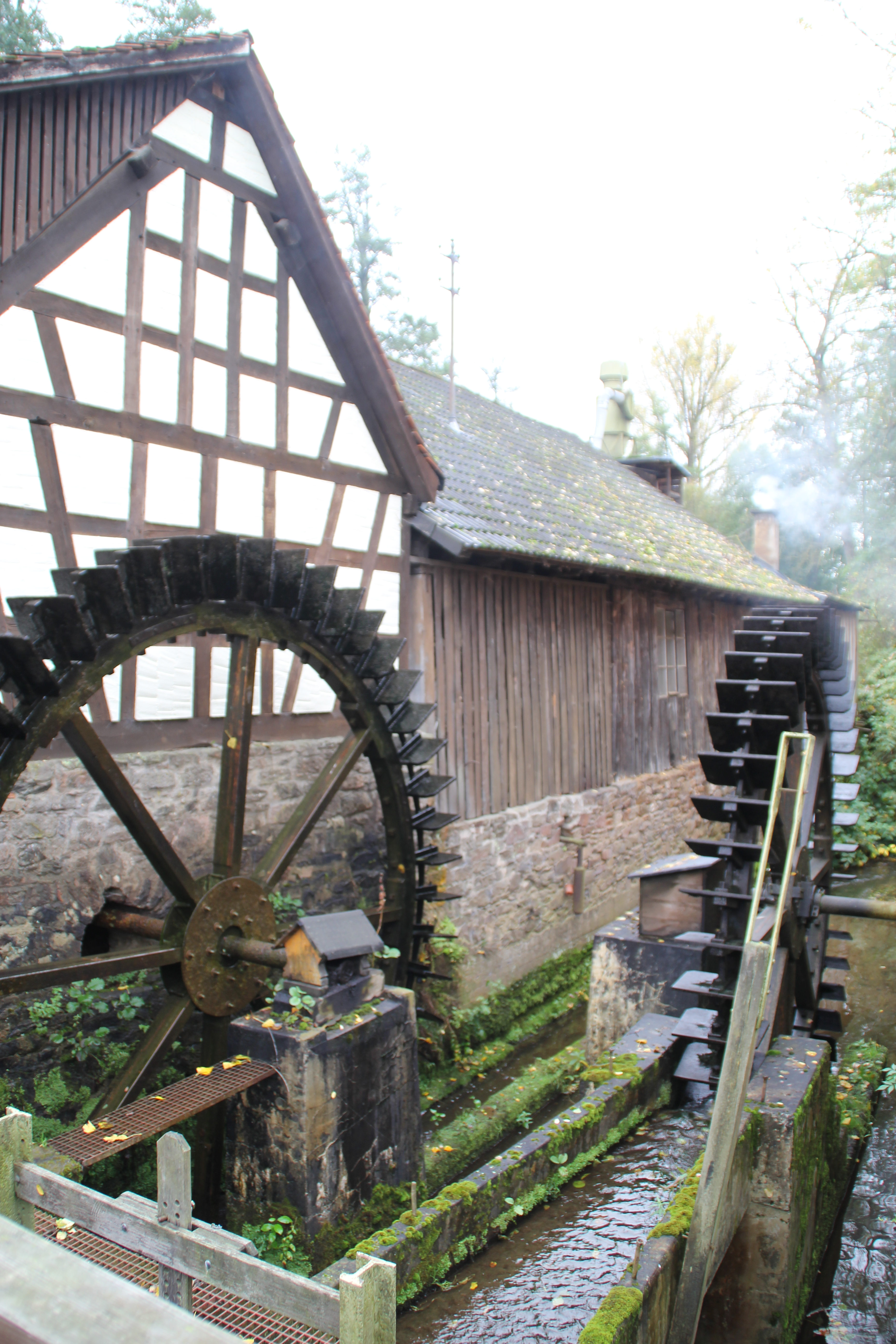 Die Mühlräder der Kaltenberger Mühle im Jahr 2019